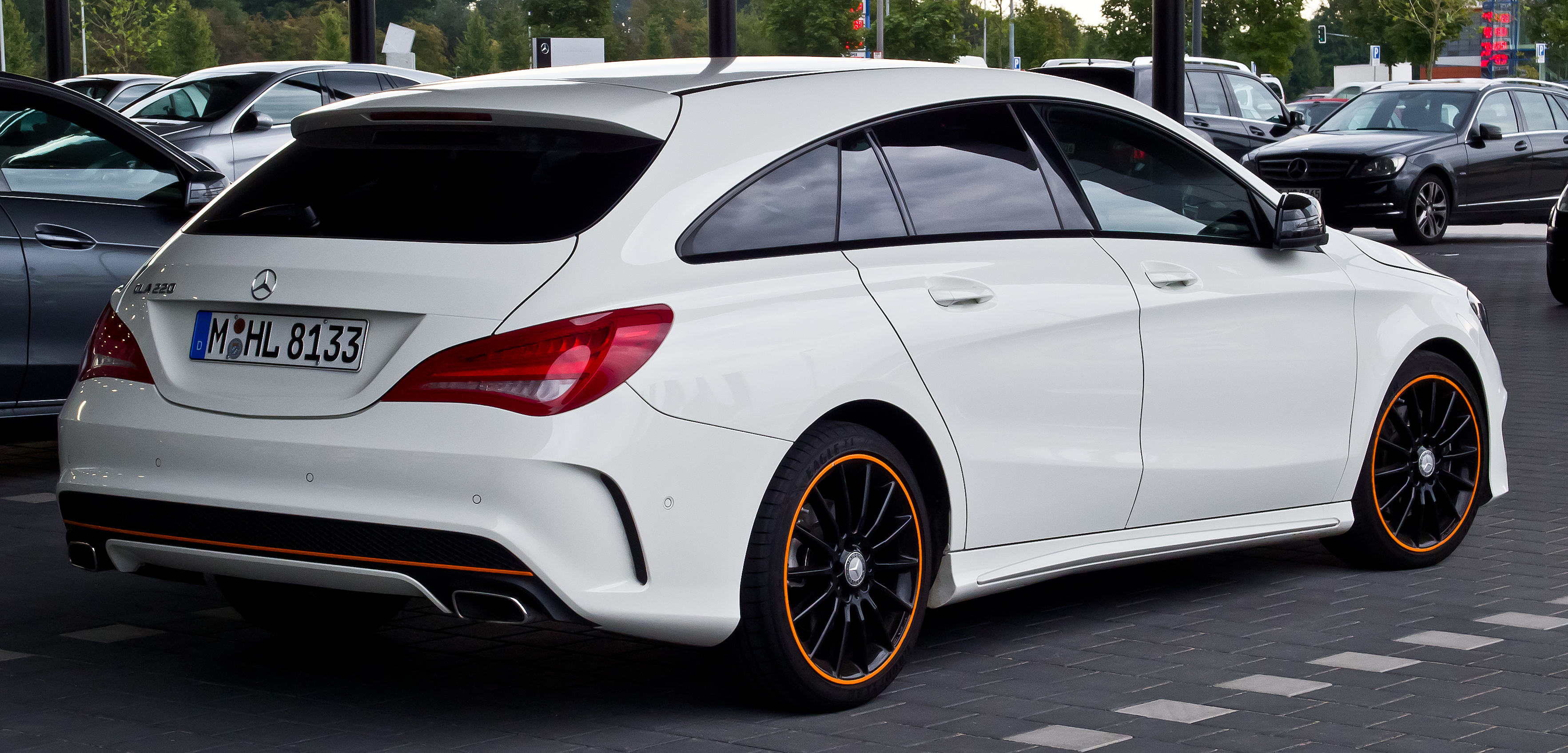 Mercedes-Benz CLA 220 d Shooting Brake OrangeArt Edition (X 117)